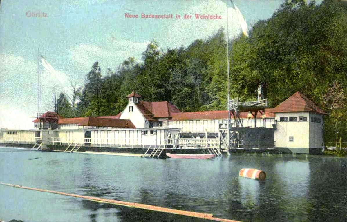 Die einstige Flussbadeanstalt in der Weinlache an der Lausitzer Neiße in Görlitz